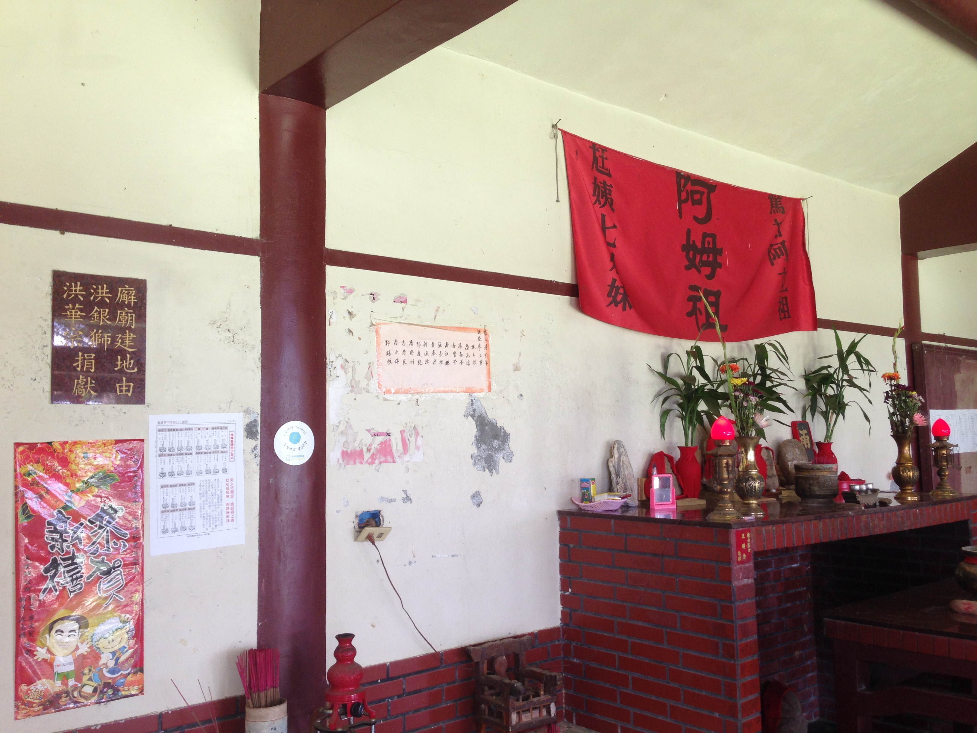 中埔公廨廟捐地人牌